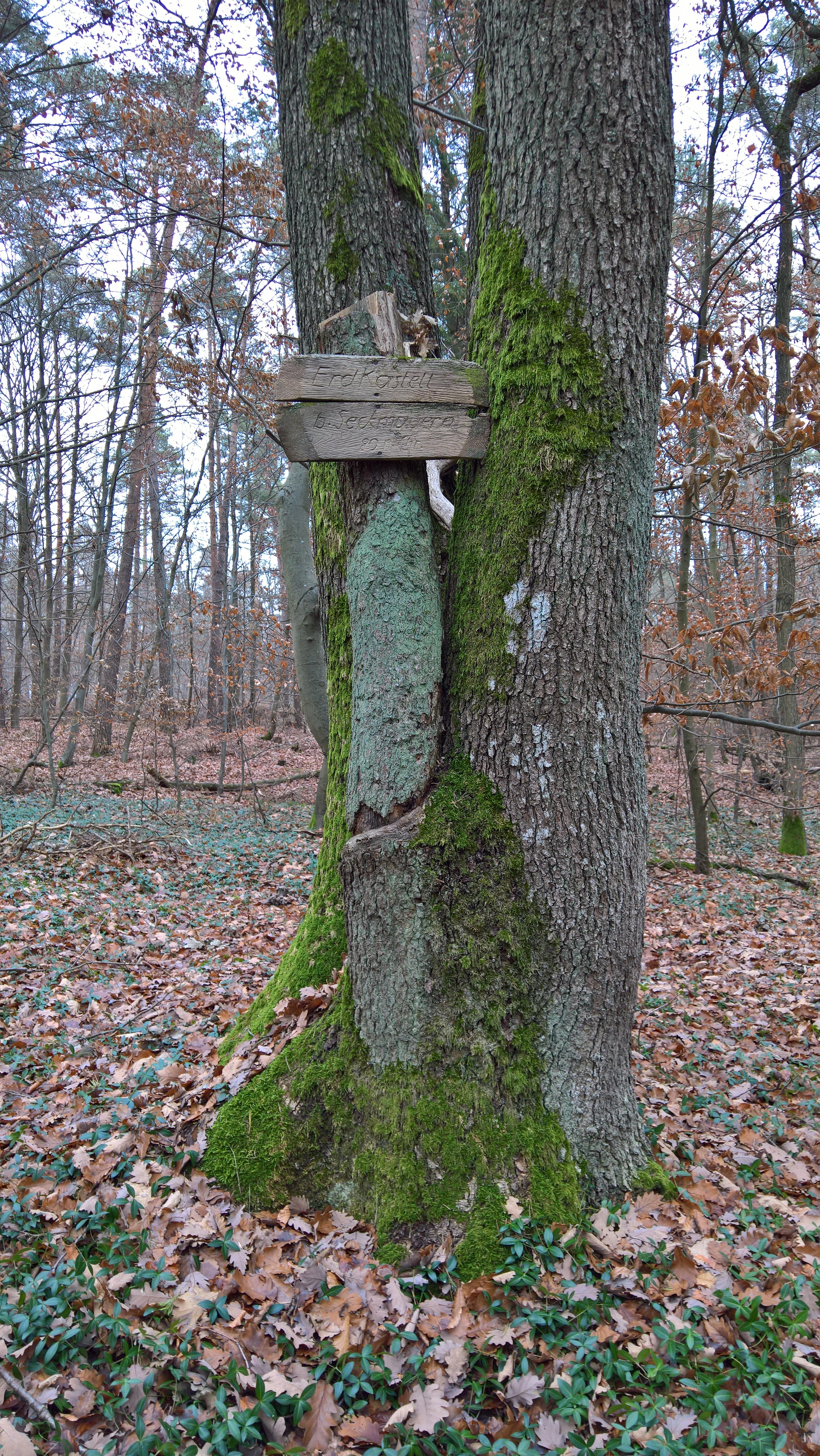 Kastell Seckmauern (Ausschnitt, alte Kennzeichnungstafel)